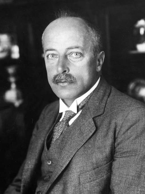 ADN-ZB 13.11.1961 Max von Laue Physiker, geb. 9.10.1879 in Pfaffendorf bei Koblenz gest. 24.4.1960 in Berlin; Professor in Zürich, Frankfurt (Main), Berlin, Göttingen, Direktor des Fritz-Haber-Institut der Max-Planck-Gesellschaft in Berlin; erhielt 1914 den Nobelpreis. Max von Laue im Alter von fünfzig Jahren. (Aufn.: 1929) 30835-29